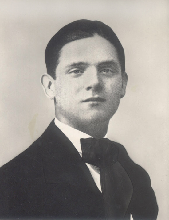 Attilio Deffenu (Nuoro, 28 dicembre 1890 – Fossalta di Piave, 16 giugno 1918) è stato un intellettuale e un giornalista italiano, esponente del sindacalismo rivoluzionario e dell'autonomismo sardo. Biografia